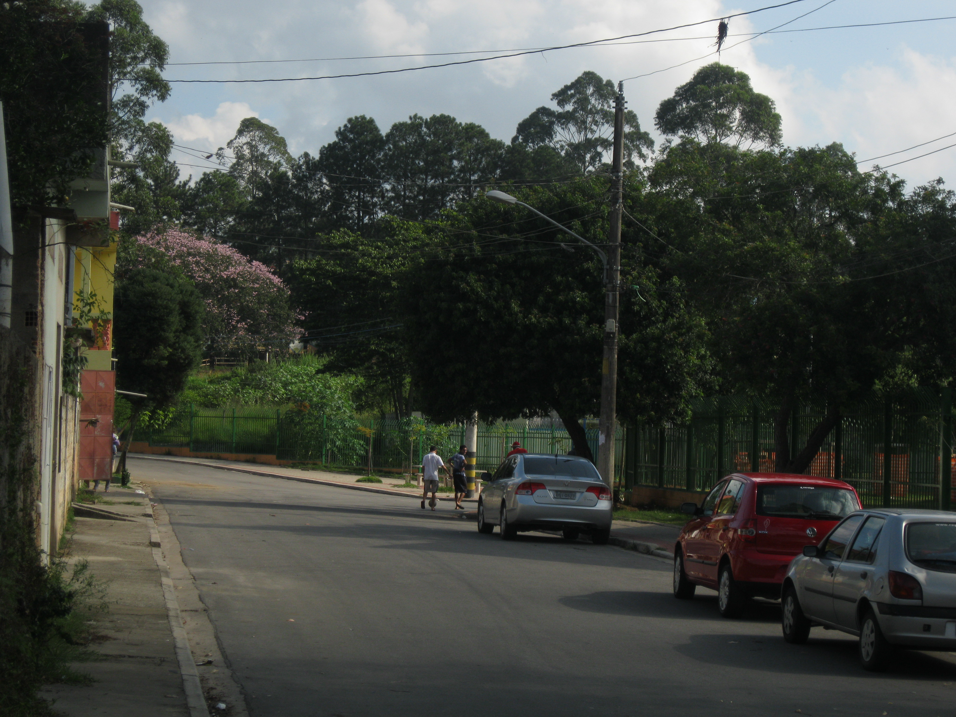 Jornada Fotográfica na Vila Gilda